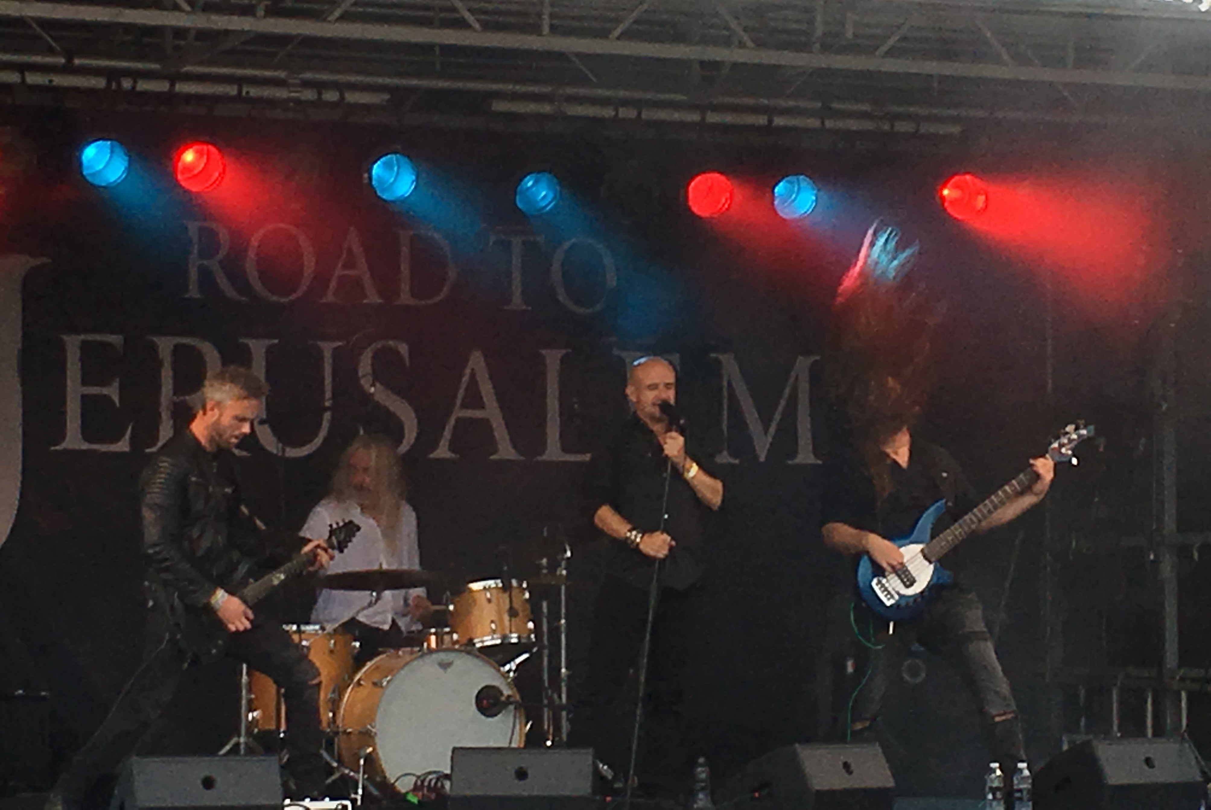 Road to Jerusalem spiller i Næstved august 2018